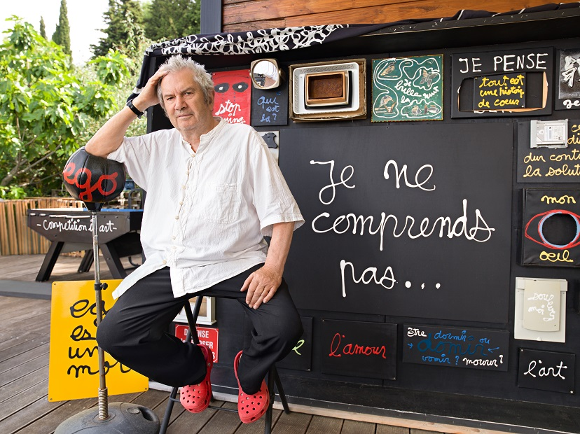 Ben Vautier dans son atelier de Nice photographié par Gil Zetbase (2016)